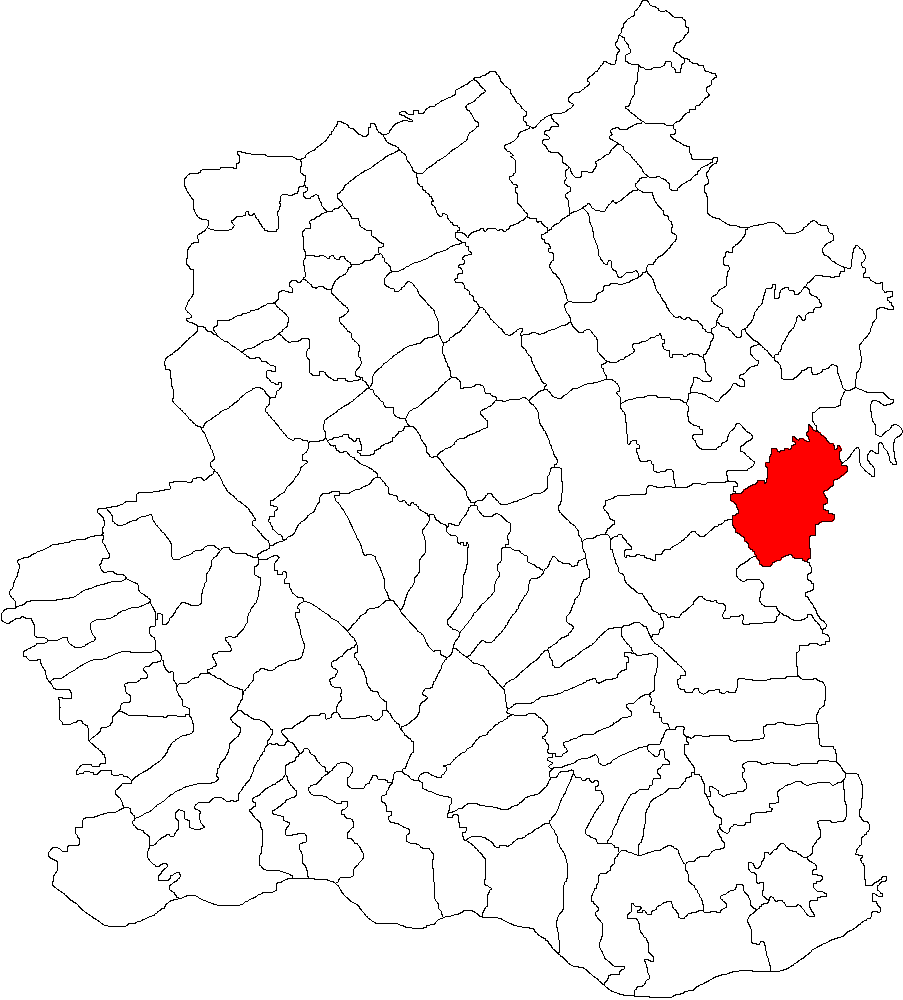 Categorie:Hărţi ale judeţului Teleorman